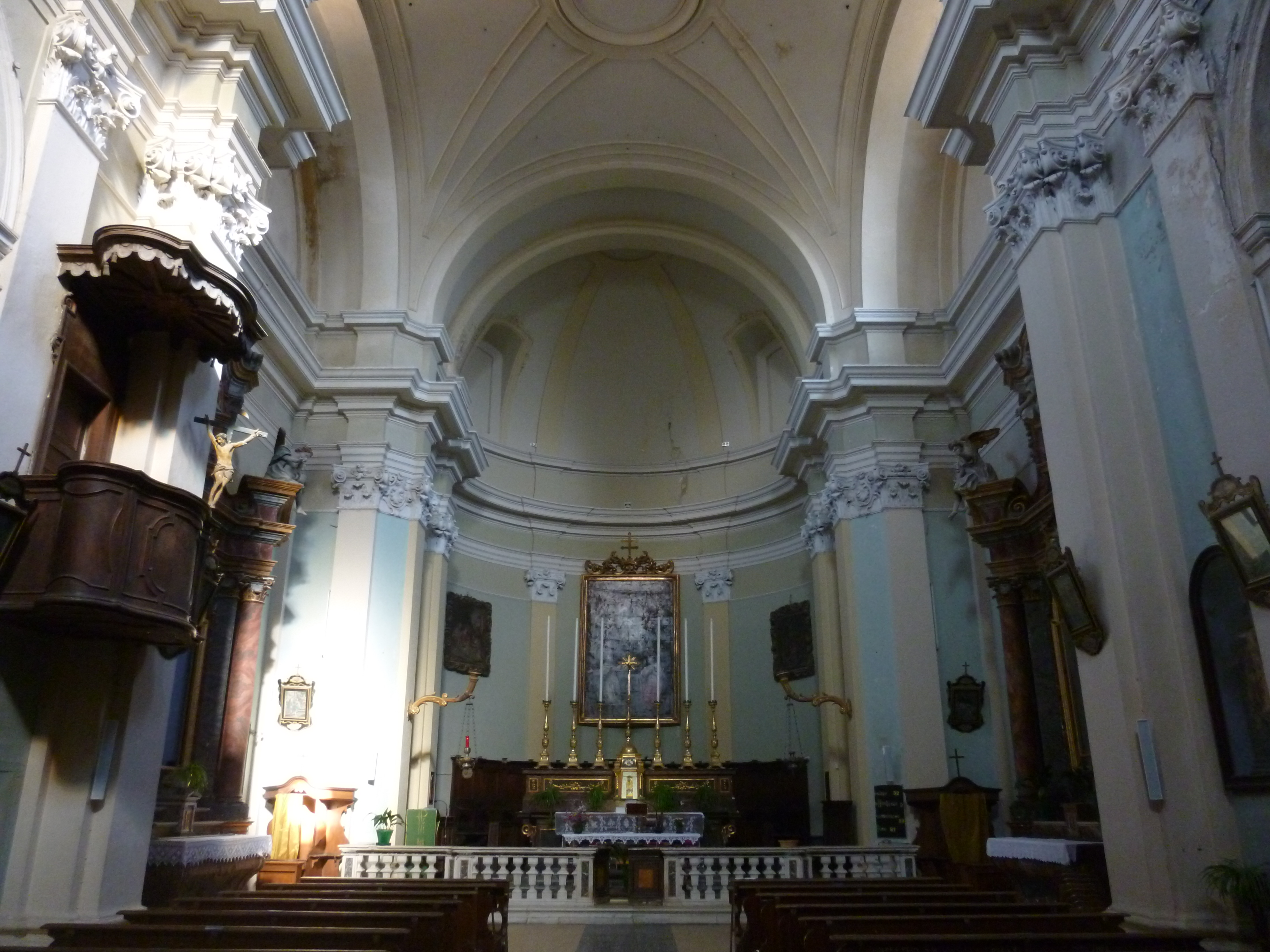 interno della Chiesa di San Francesco - Mondavio This is a photo of a monument which is part of cultural heritage of Italy.